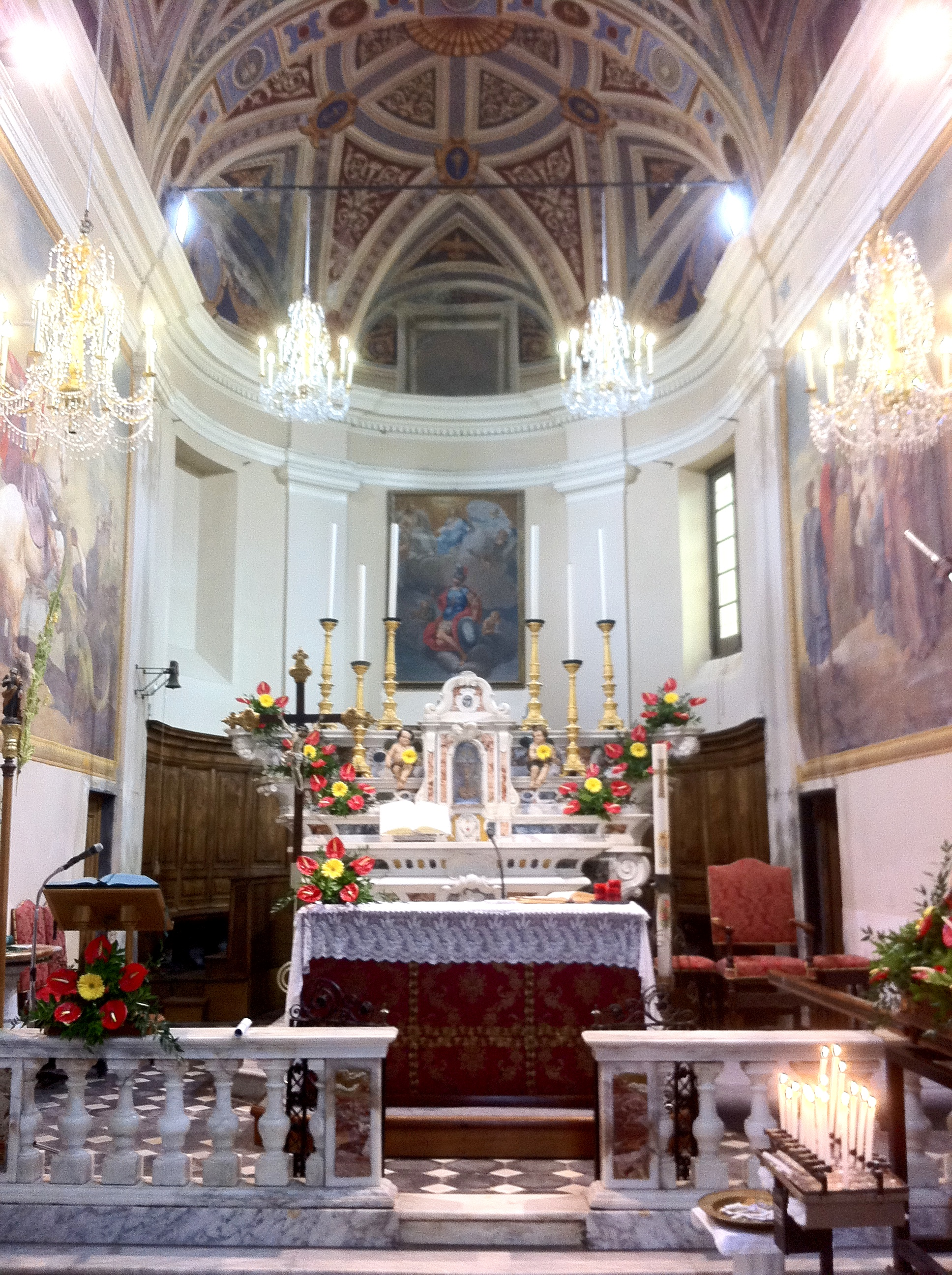 Chiesa di San Giorgio in Sanda di Celle Ligure (Italy)